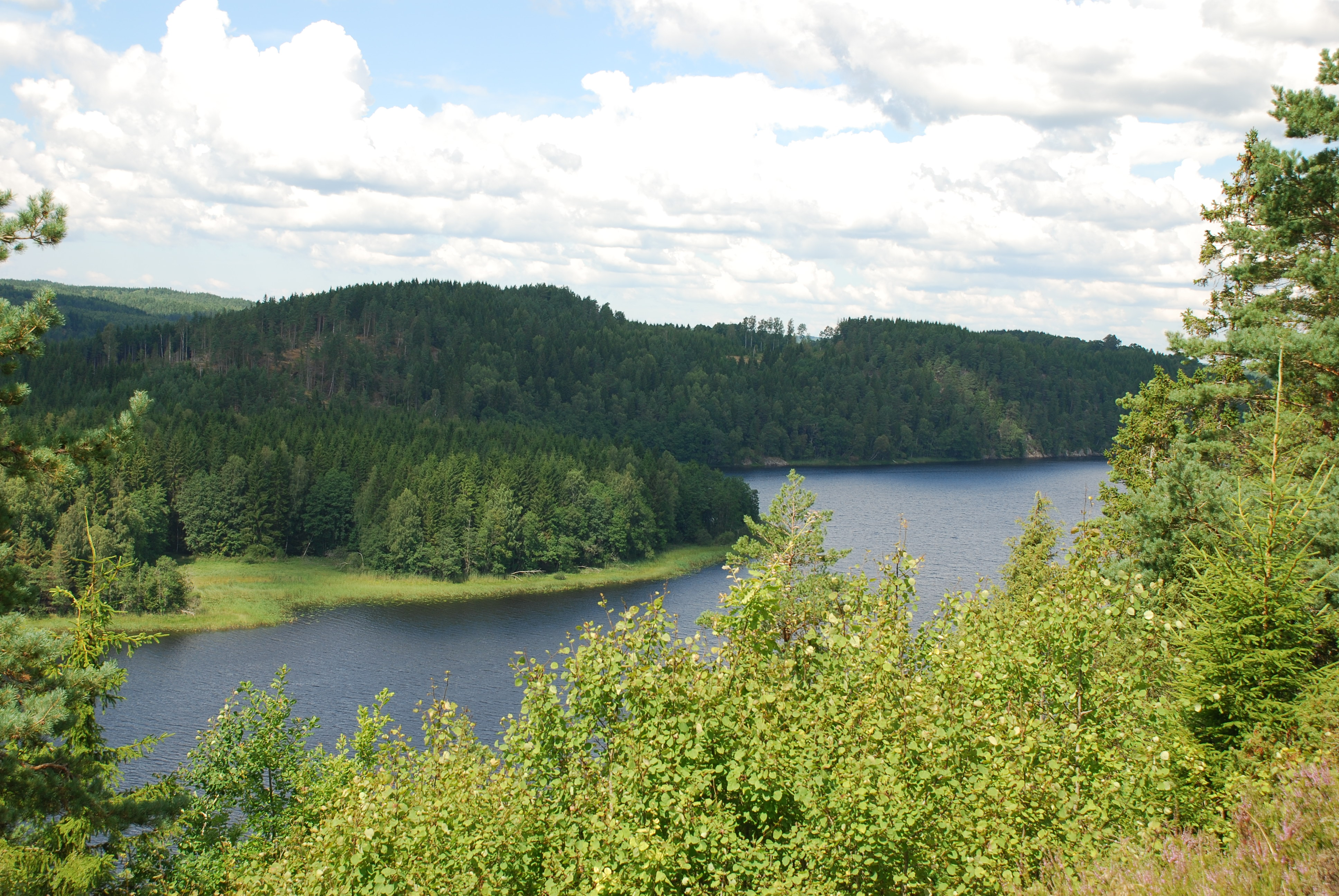 Södra Bullaresjön i Naverstads socken i nuvarande Tanums kommun i Bohuslän, sedd från Olsborgs borgruin.